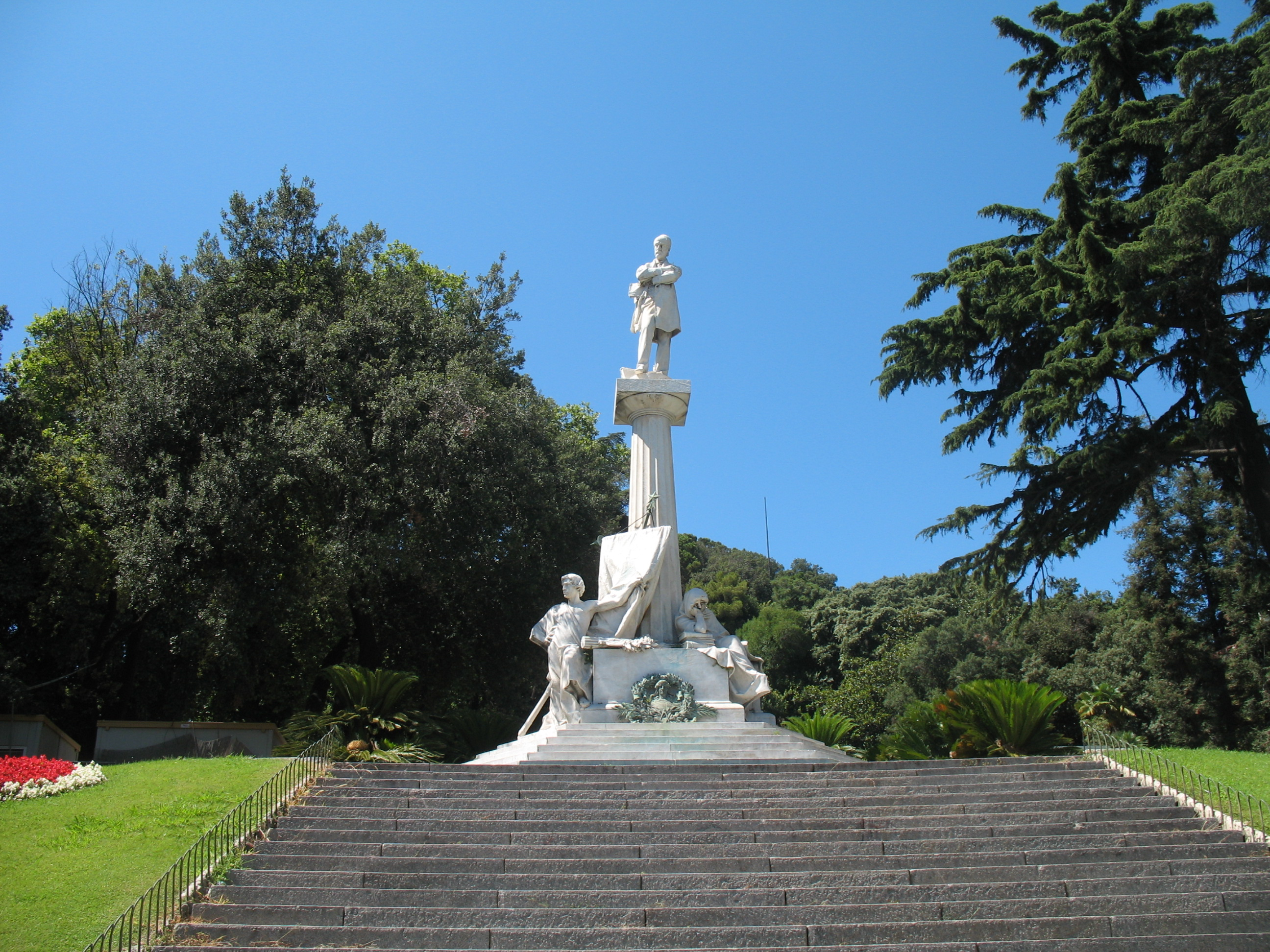 Piazza Corvetto a Genova (Italia), statua a Giuseppe Mazzini